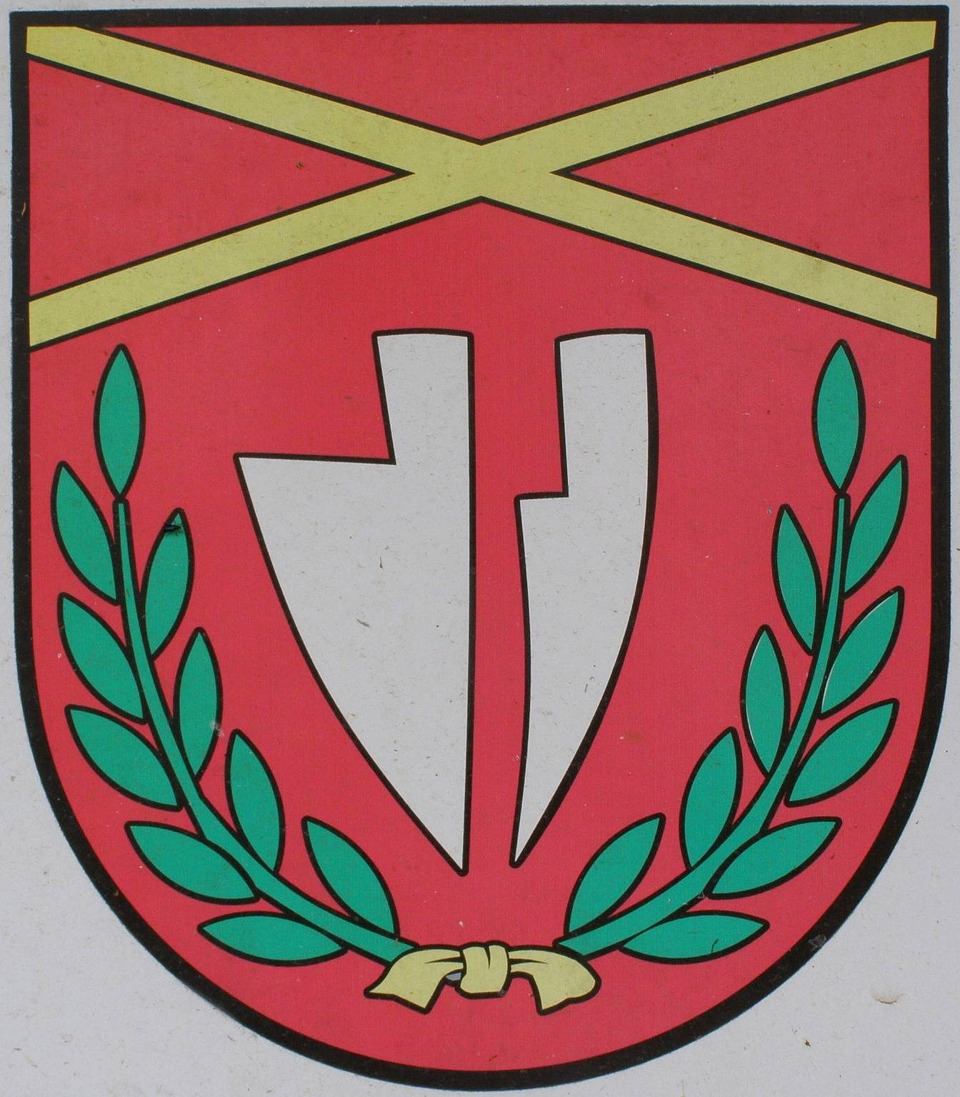 Erb Ondrejoviec